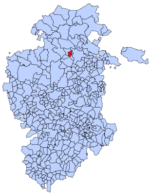 Situación de Aguas Cándidas en el mapa de Burgos.